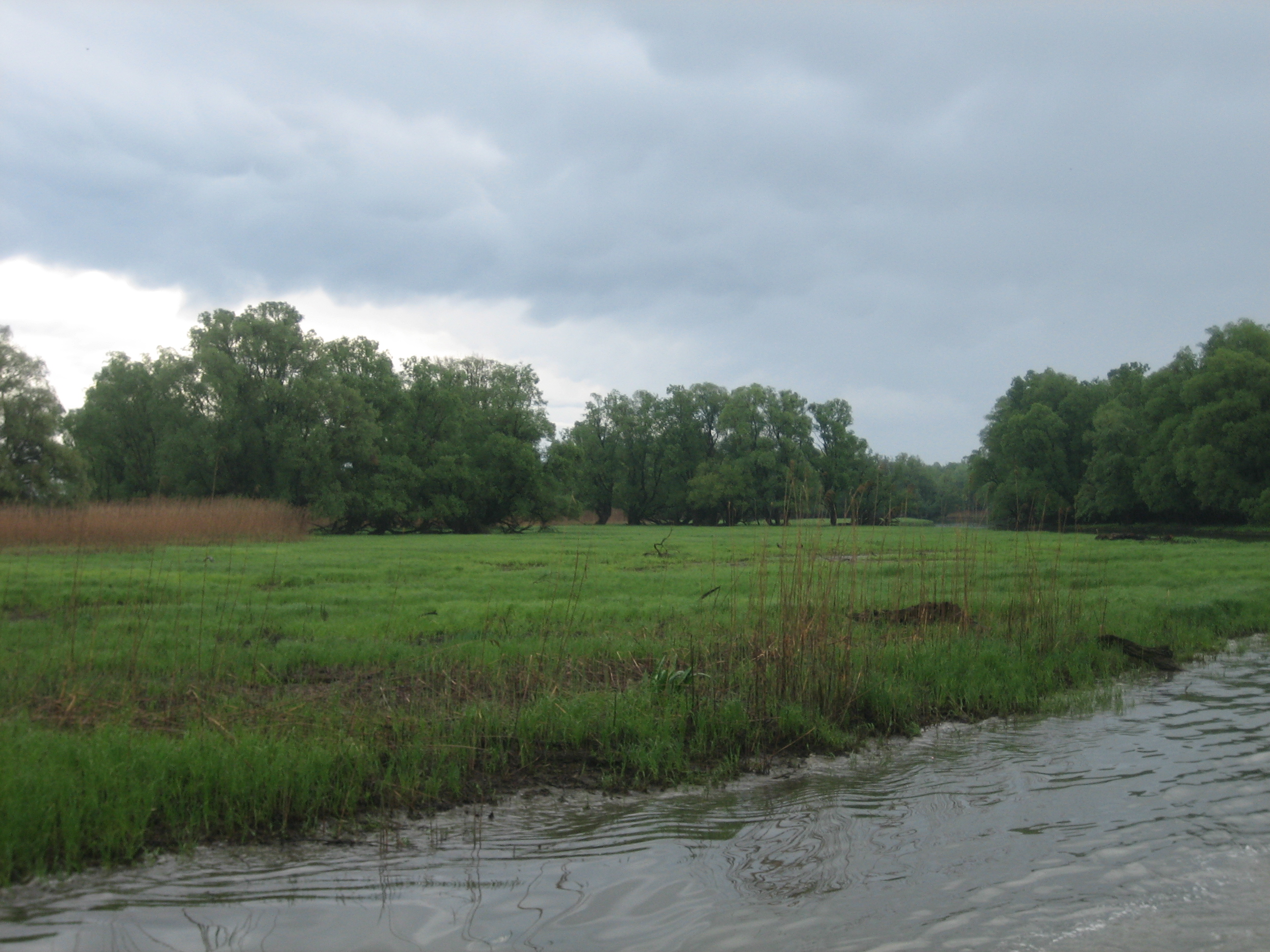 Kopački rit, a nature park in Baranja, eastern Croatia / Park prirode Kopački rit u Baranji.